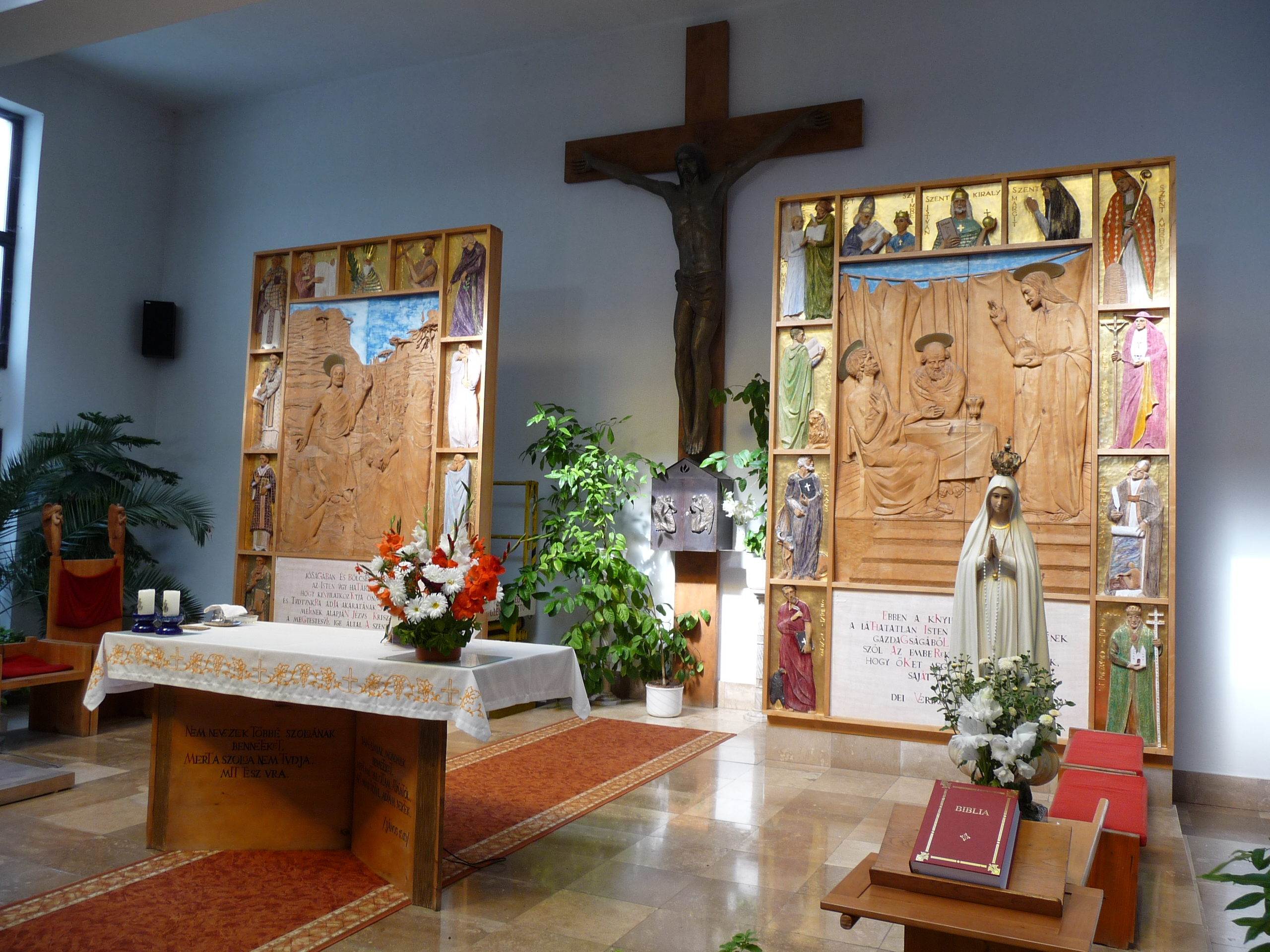 Csörötnek, az Örök Ige temploma. Az oltárfalak (fa, 1985, Fazakas Péter és Kiss Sándor (szobrász, 1925–1999) műve)